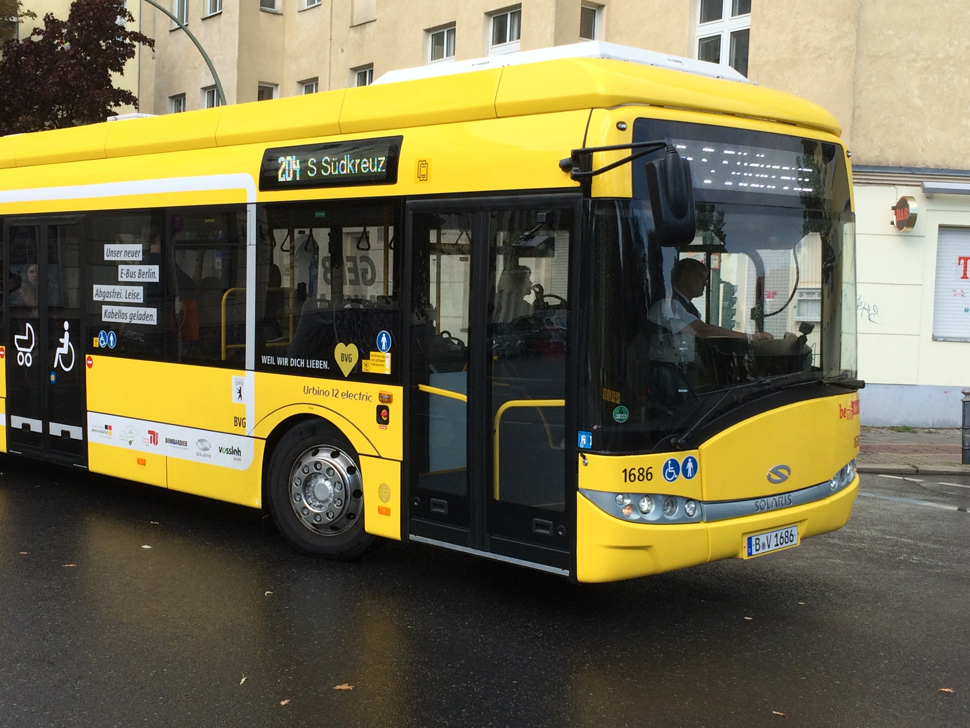 BVG-Bus der Linie 204 - Solaris-Urbino 12 electric (E-Bus), Torgauer Str (Rote Insel)